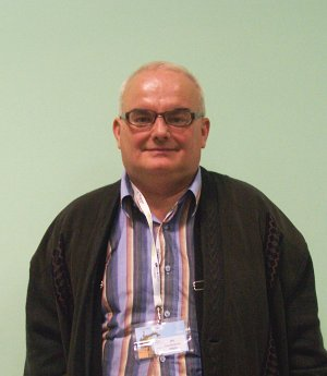 Jan Plata-Przechlewski na konwencie Polcon 2007 w Warszawie